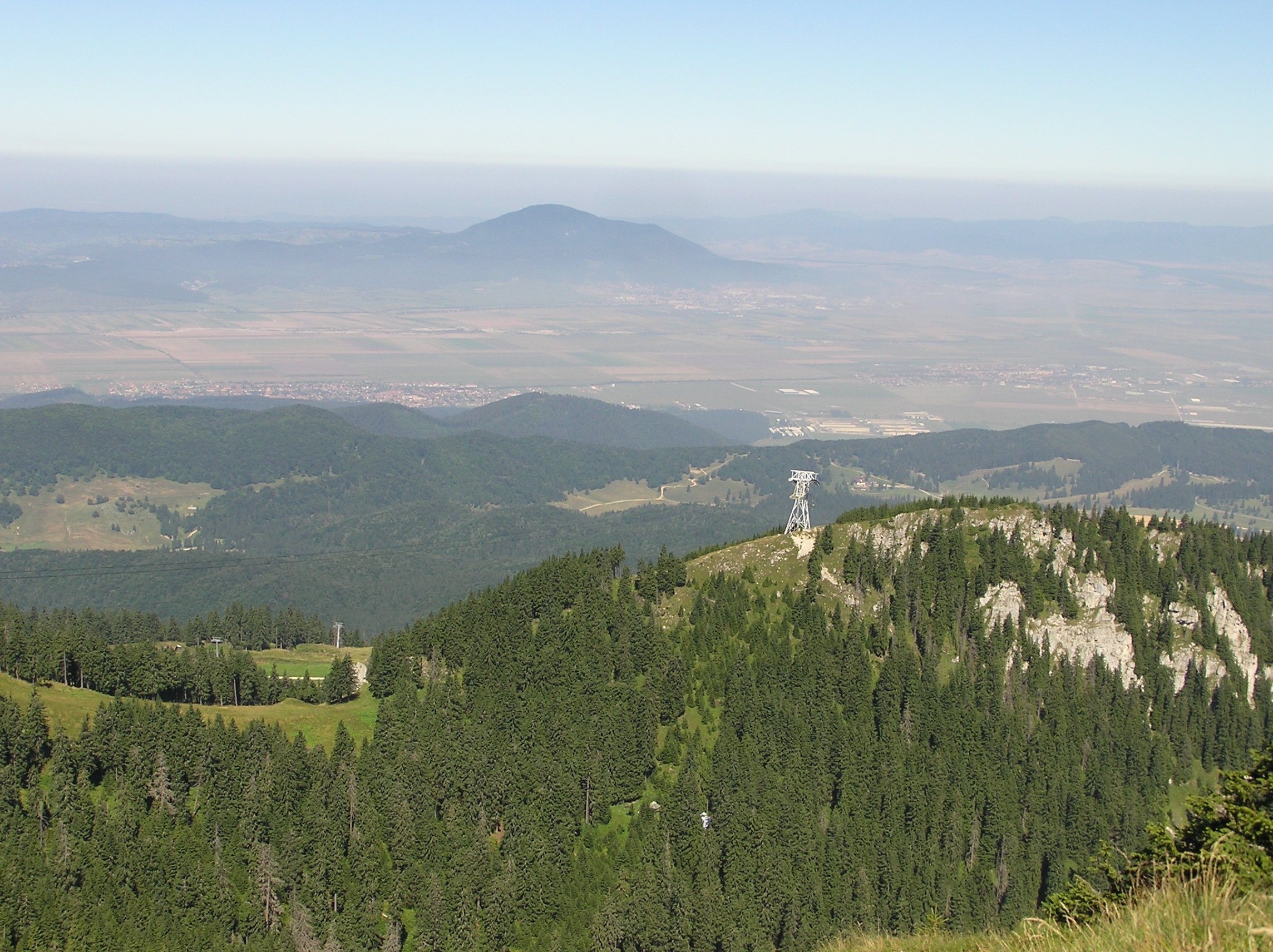 Sicht vom Postăvarul-Gebirge (Schuler) auf einen Teil des Burzenlandes, Siebenbürgen, Rumänien.